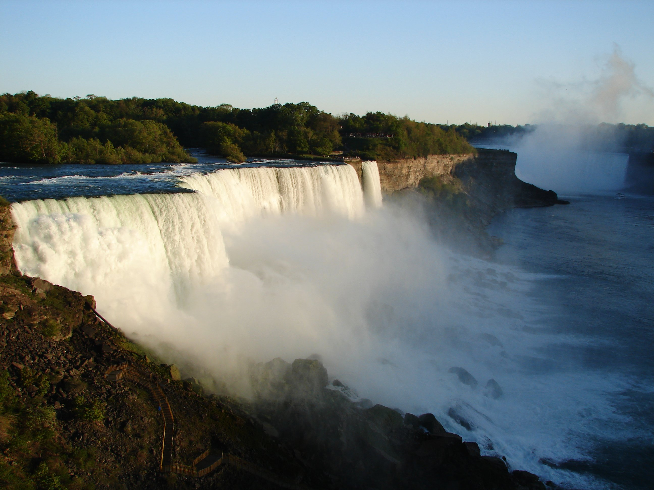 നയാഗ്രാ വെള്ളച്ചാട്ടം - വശത്തുനിന്നുള്ള ദൃശ്യം